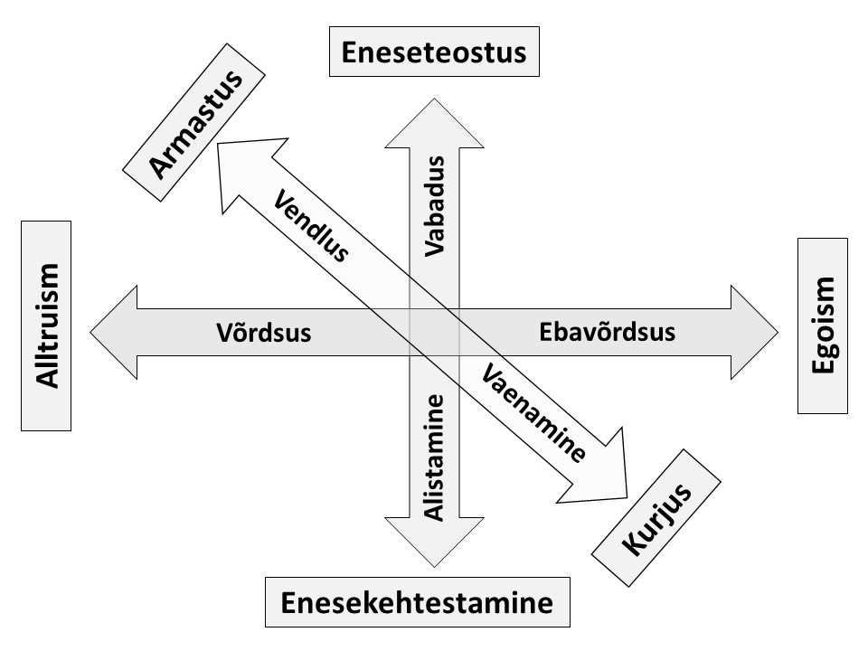 Kolmas dimensioon poliitikas